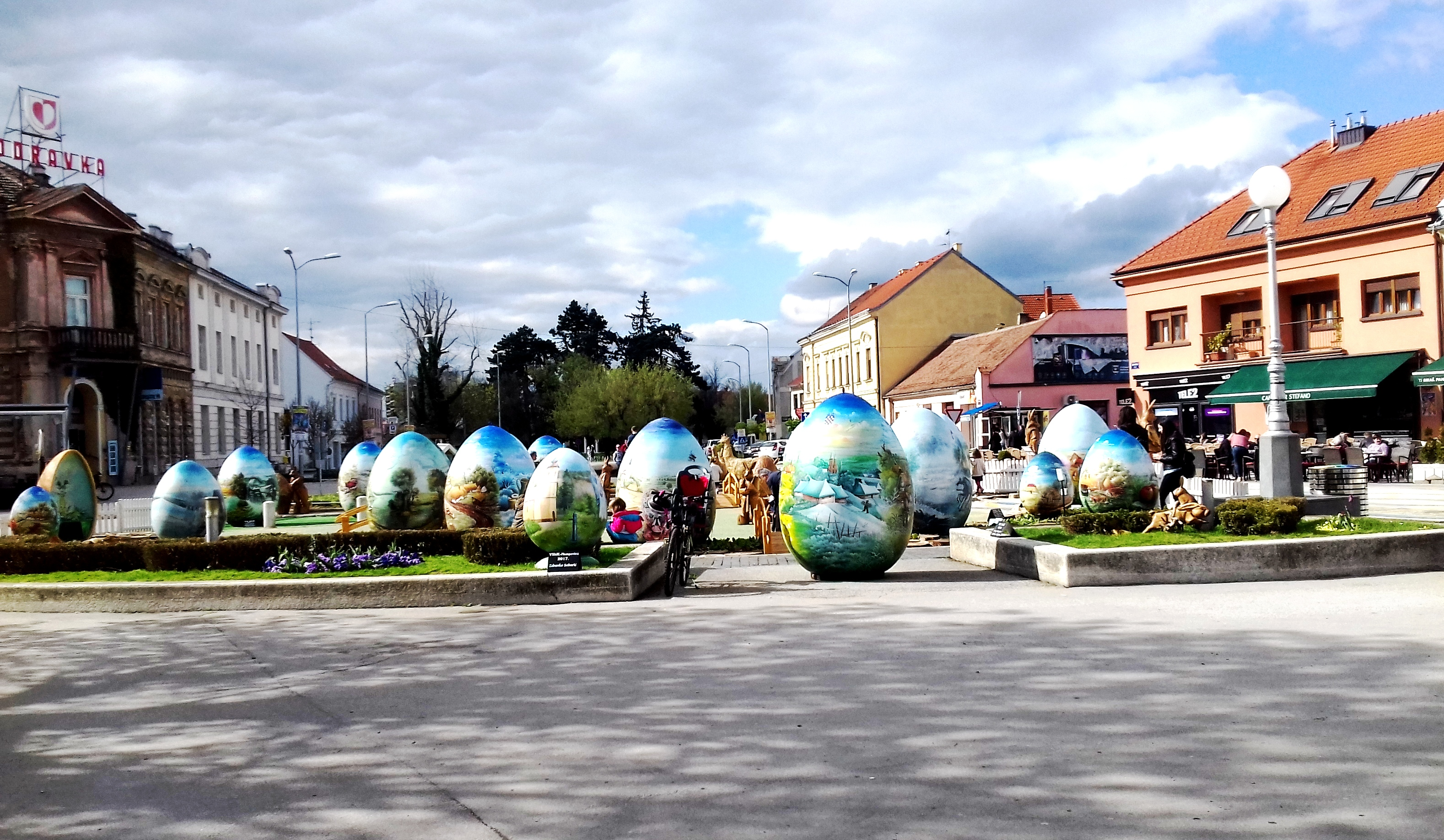 2019-es tojások, Kapronca